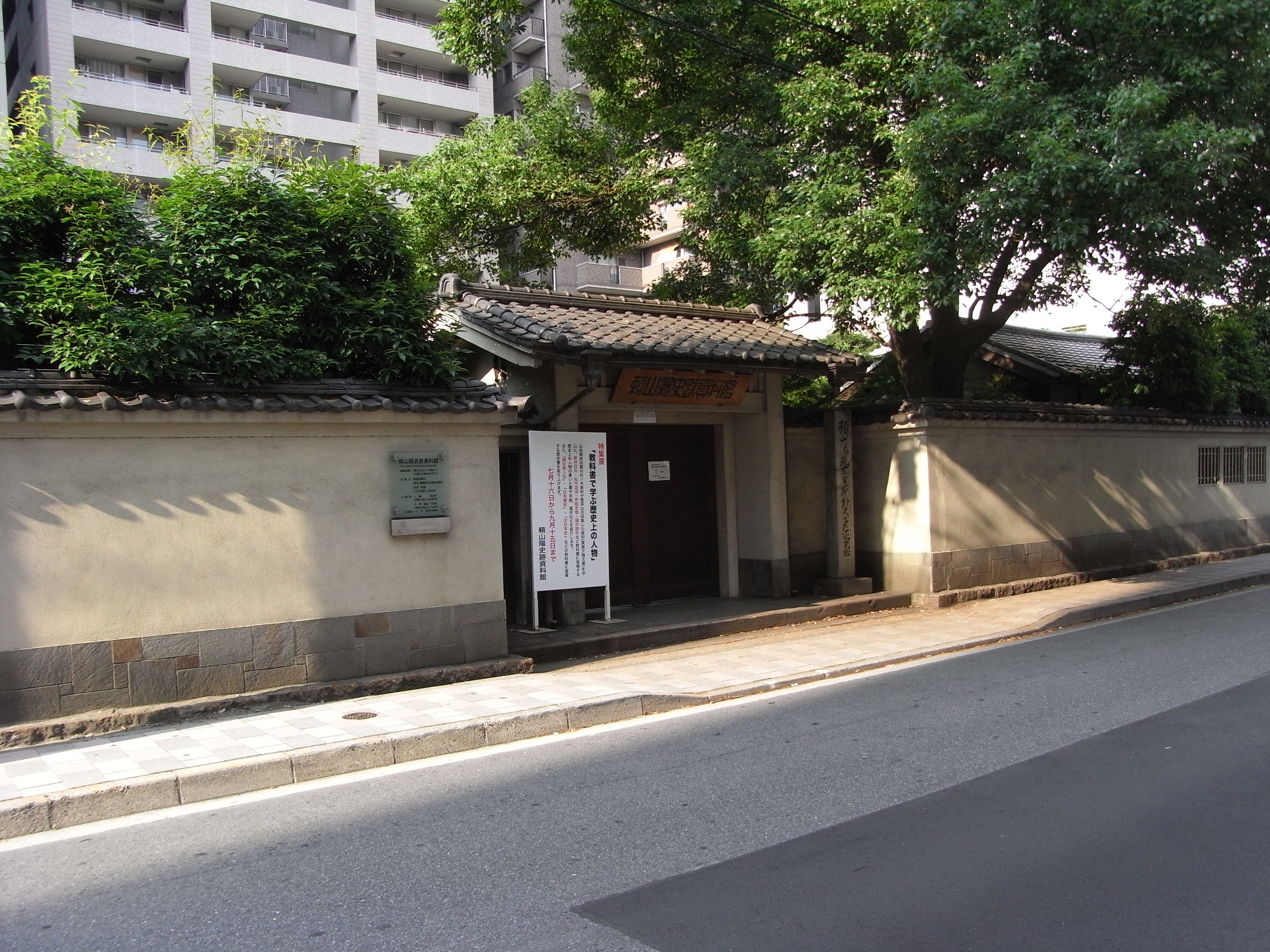 2008年7月本人撮影 頼山陽史跡資料館 Rai Sanyō Shiseki Museum, Hiroshima, Hiroshima, Japan.